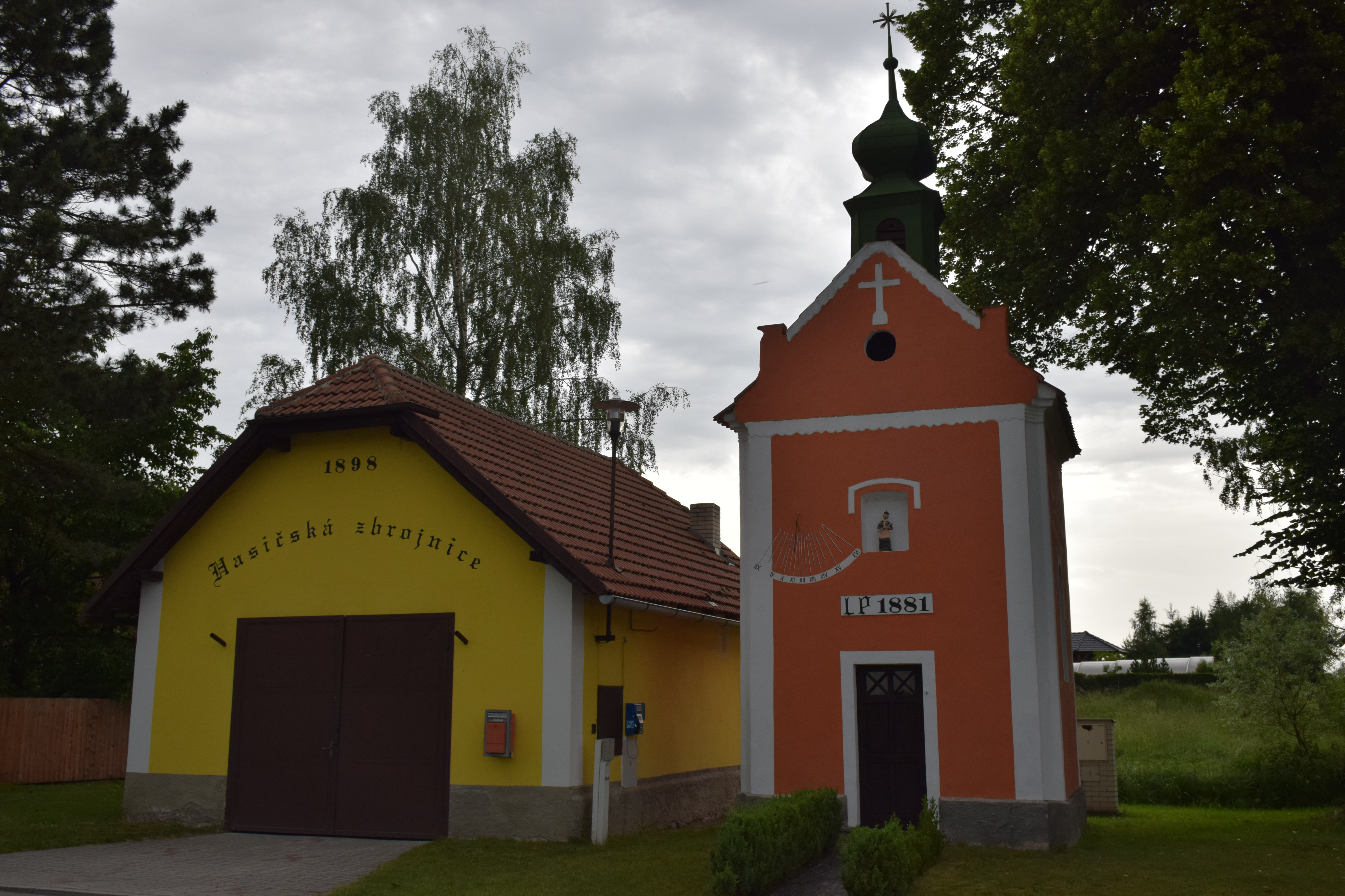 Skrýchov u Malšic, Česká republika.